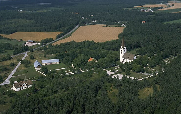 Motiv: Othems kyrka Nyckelord: Flygbilder, Riksintressen Kategori: Kyrkomiljö Othems kyrka